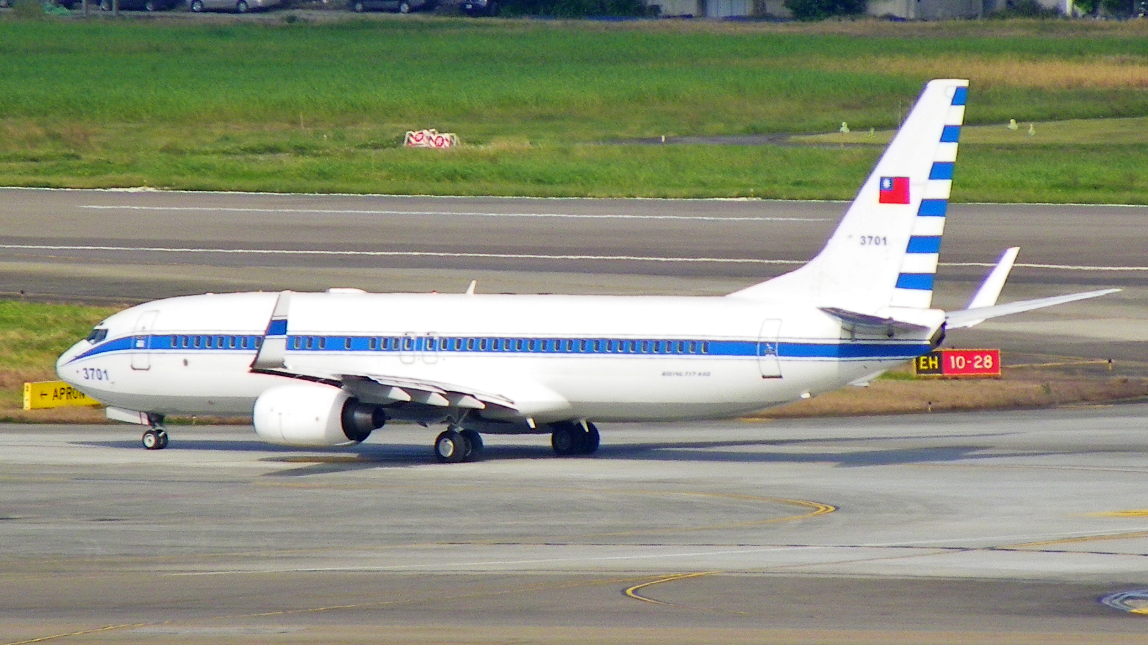 2011年12月25日，自松山機場停機坪移動準備起飛的空軍波音737-800總統座機。